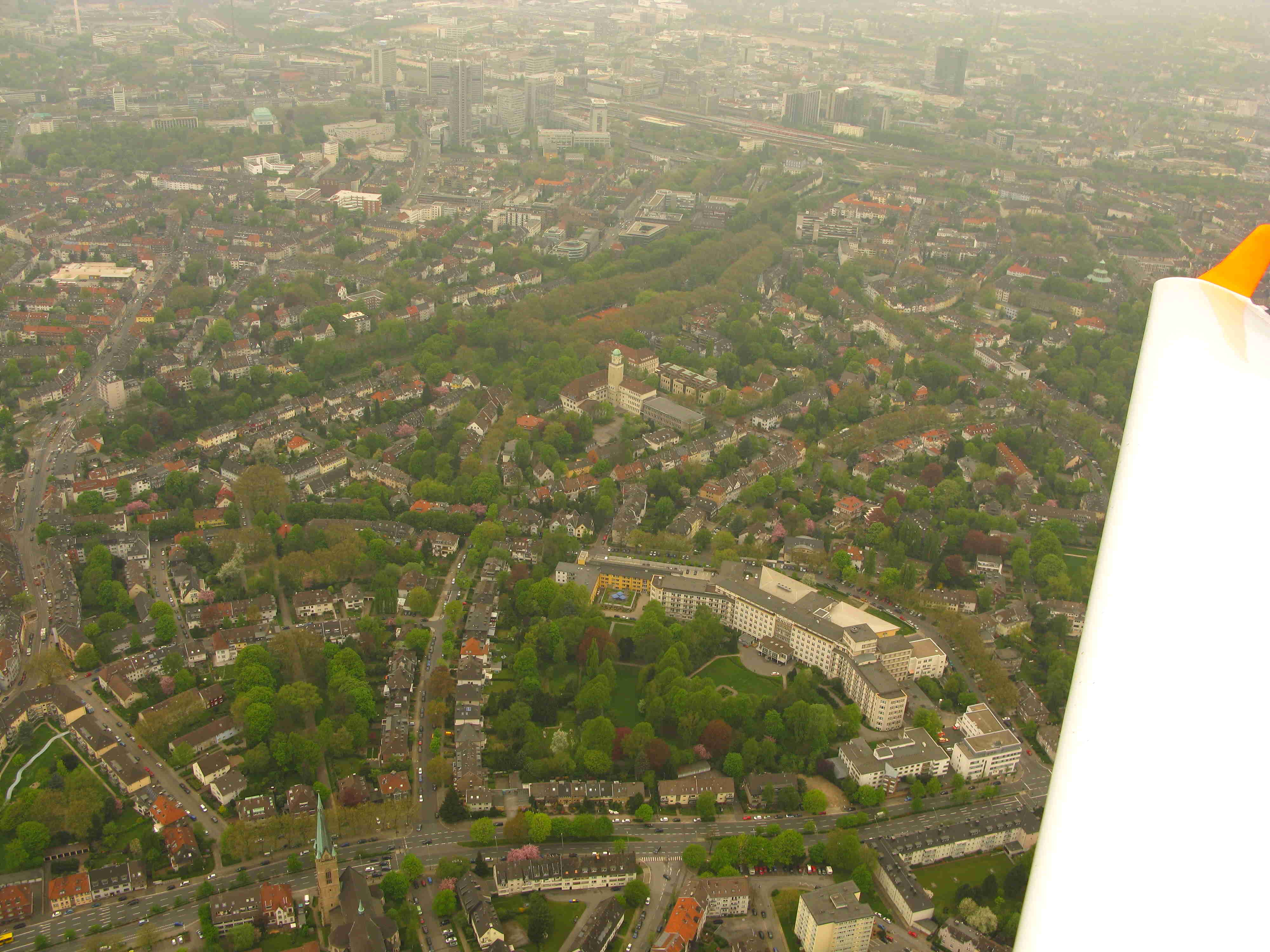 Luftbild Essen Moltkeviertel von Südosten